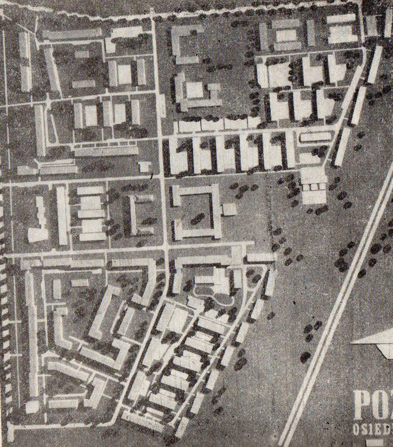 Osiedla Klinu Dębieckiego w Poznaniu.